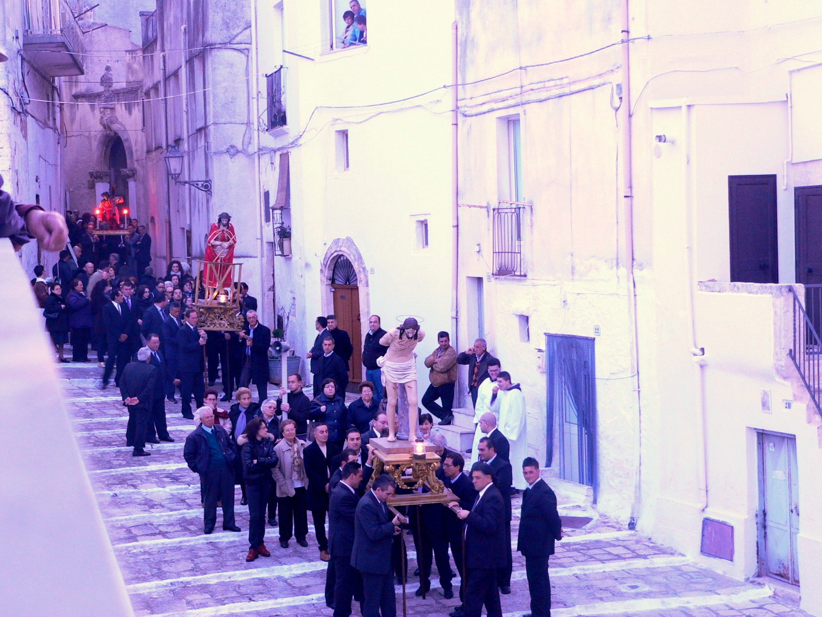 Una parte della Processione dei Misteri che si snoda in occasione del Venerdì Santo per le vie di Ceglie Messapica. La foto è scatta in via Vitale in una delle prime fasi della processione